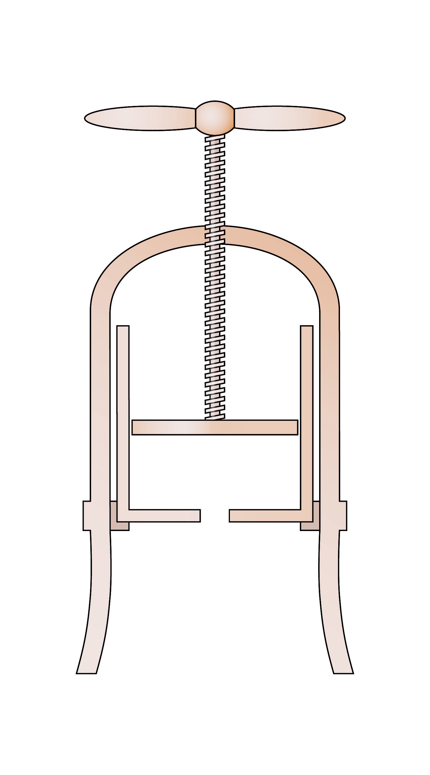 Querschnitt durch eine Entenpresse